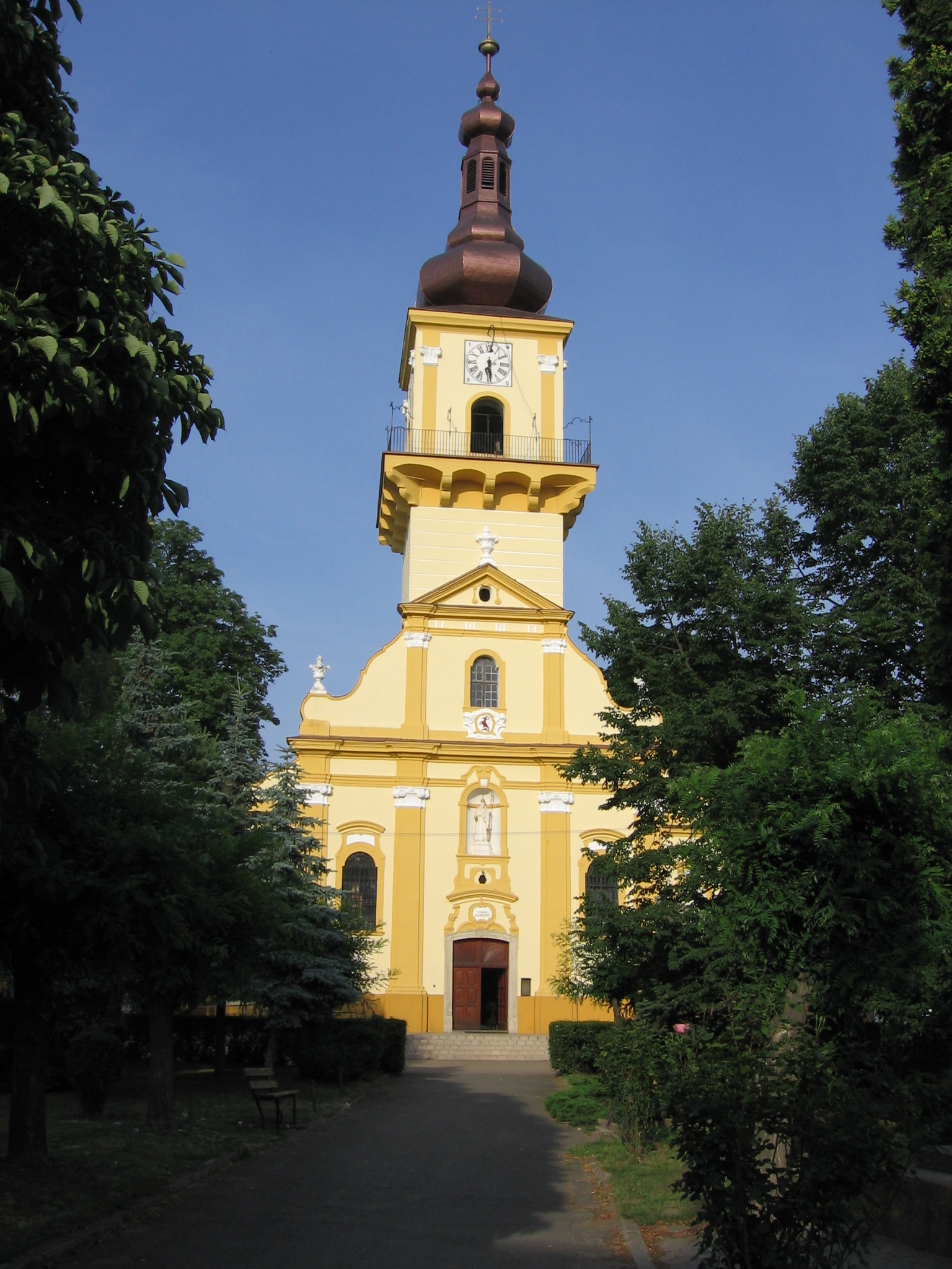 Kategória:Obrázky budov Kategória:Presunúť na Commons